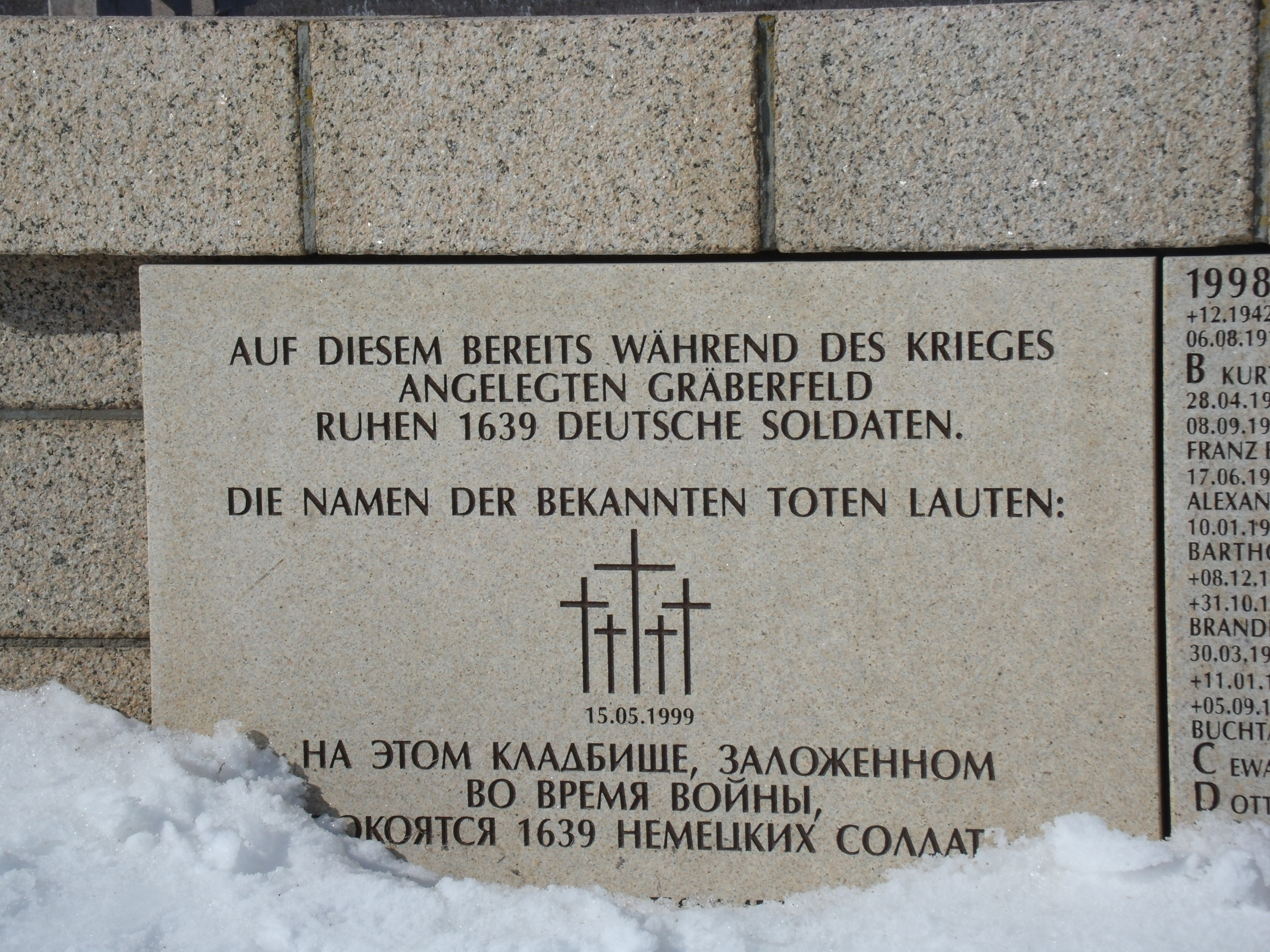 Gedenktafel alter Friedhof